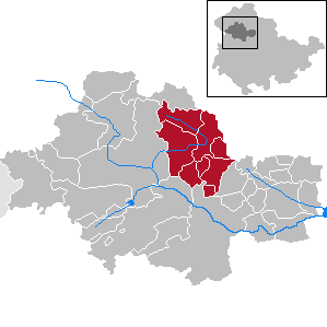 Verwaltungsgemeinschaft Schlotheim in Thuringia - Unstrut-Hainich-Kreis